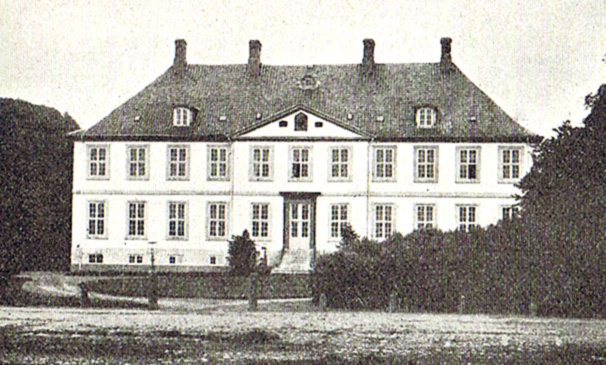 Hagenskov var oprindeligt en dansk middelalderborg og er nævnt som krongods i 1251. Hagenskov var et kongeligt len. Den ligger i Sønderby Sogn, Assens Kommune, Båg Herred, Odense Amt.